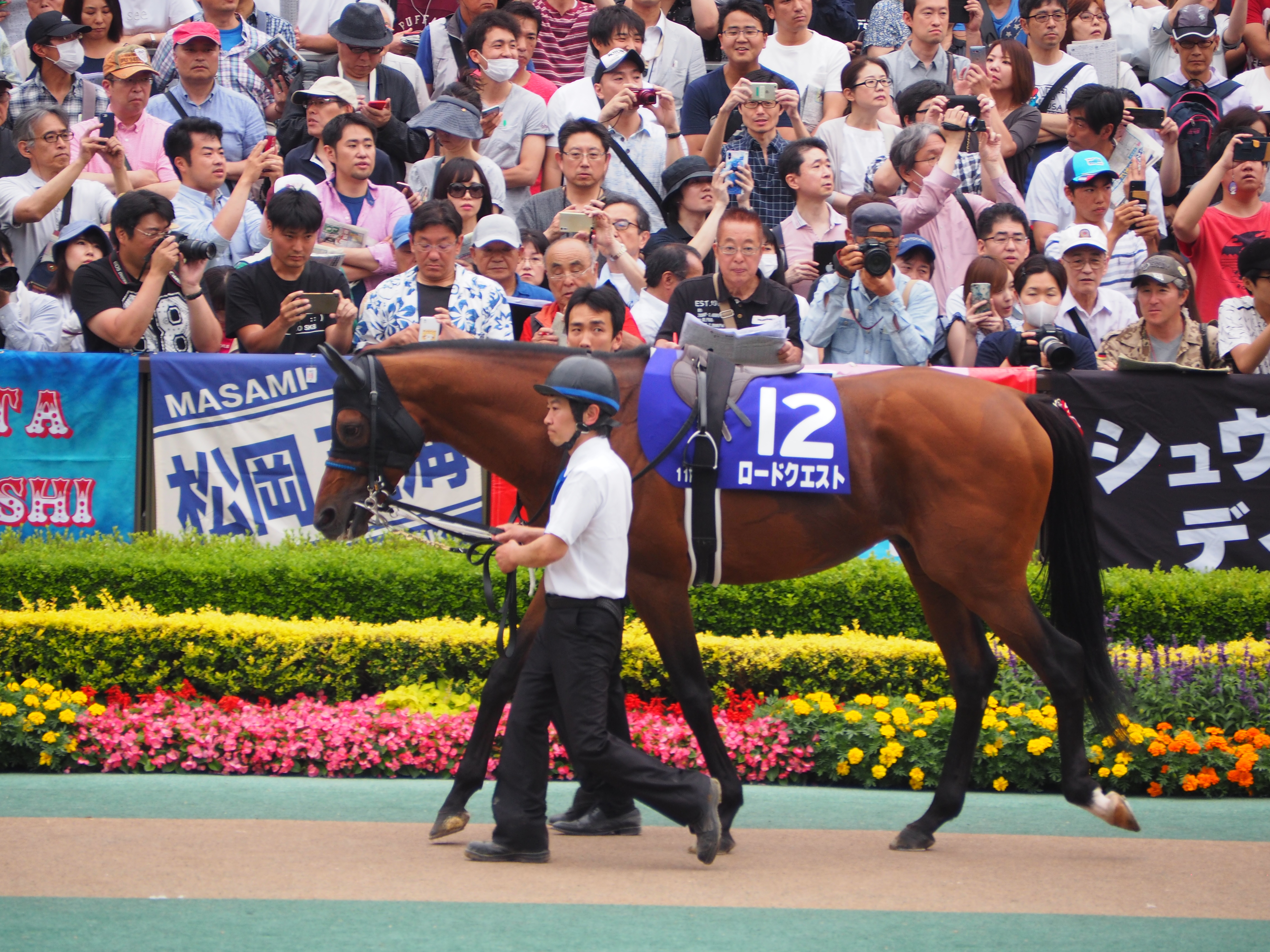 安田記念 パドック 2019